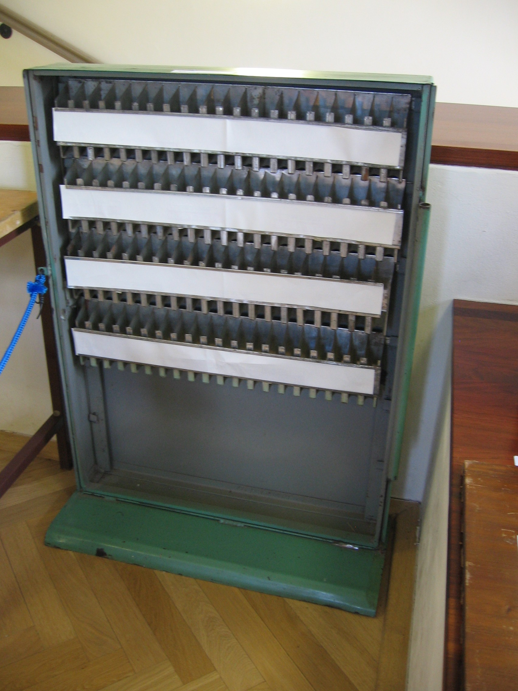 Poválečný ternion - zásobník na jízdenky na zámku Chvaly (Praha).